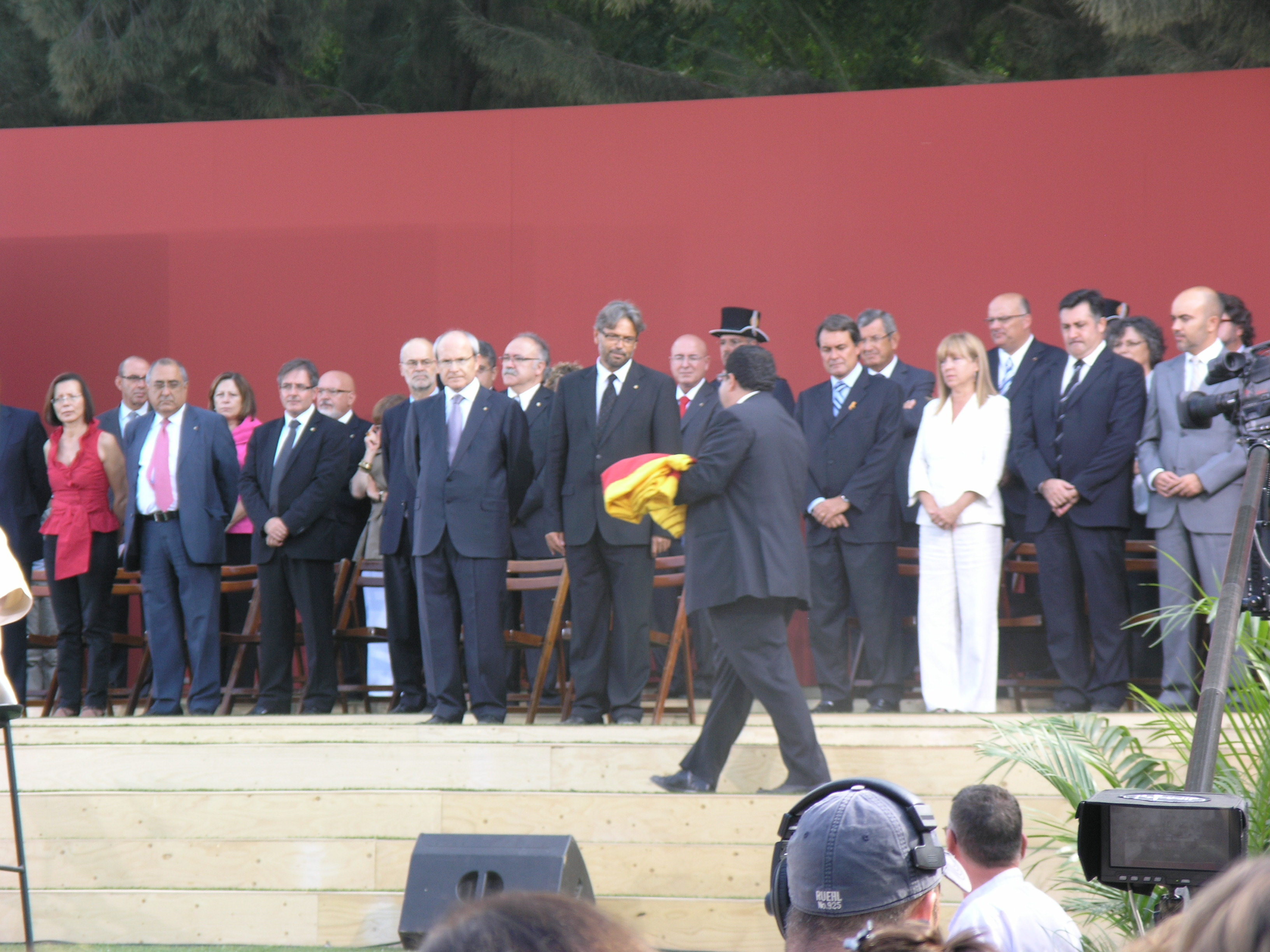 Vilanova i la Geltrú, ciutat natal de Francesc Macià, va ser la ciutat escollida per fer el lliurament de la senyera de l'acte institucional de commemoració de l'11 de setembre al parc de la Ciutadella, a Barcelona. Enguany se celebra l'any Macià, en 150è aniversari del seu naixement. El lliurament el va fer l'alcalde, acompanyat per dos representants dels geganters, que aquest any celebren els 300 anys dels Gegants.